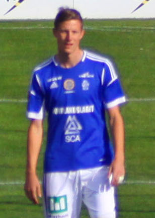 Johan Eklund